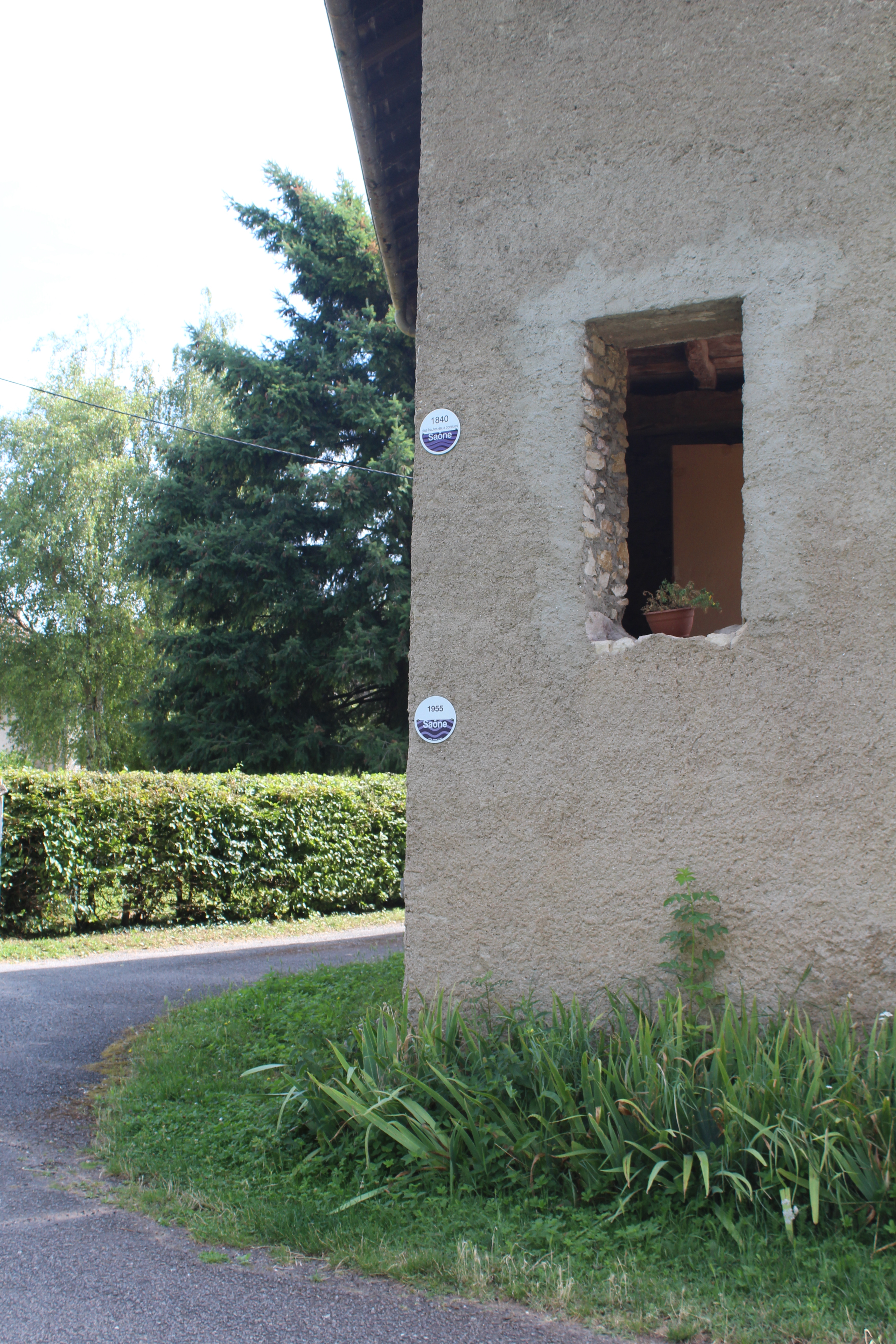 Indication sur les niveaux de crues de la Saône à Arciat, dans la commune de Cormoranche-sur-Saône.